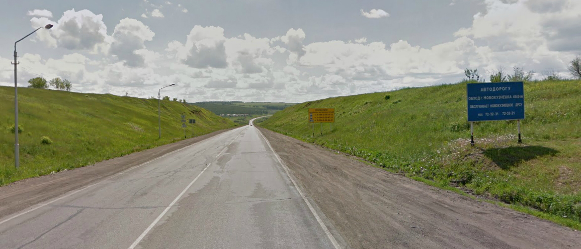 Начало трассы обхода города Новокузнецка. Калачево.